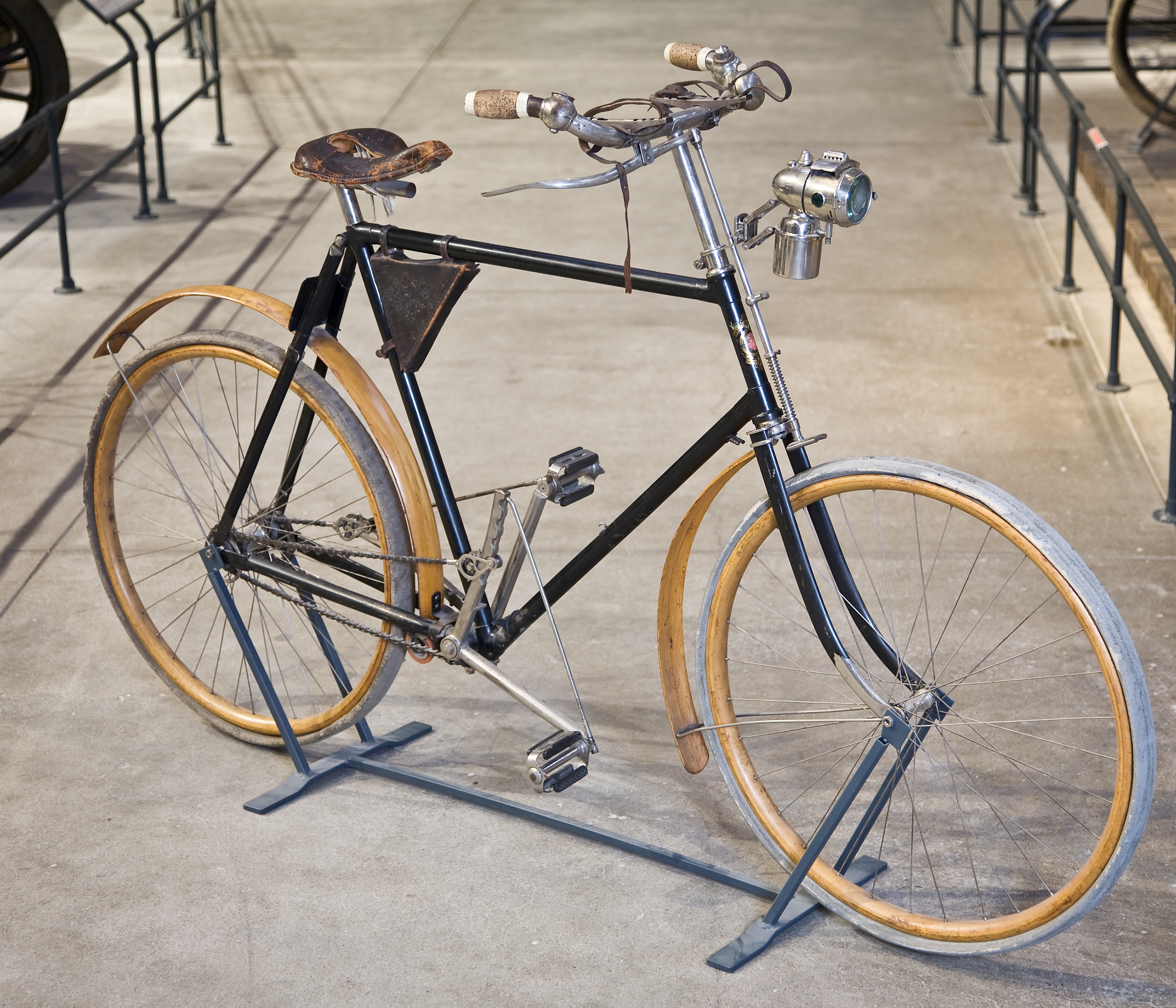 Herrcykel av typ upp-och-nertrampare (till skillnad från rundtrampare). Upp-och-nedgående pedaler med kedjor till baknavet som är en s.k. rullspärr enl. Birger Ljungströms konstruktion, patenterad 1892. Rullspärren ger frihjulsfunktion. De fram-och-återgående kedjorna ger baknavet en roterande rörelse genom två excentriska "drivskivor". Fem tryckluftsreglerade växlar. På styret finns två gummiblåsor dolda under metallhöjle. Luften leds med slangarna till ytterliggare två gummiblåsor placerade på segmenten vid tramporna. Broms på bakhjulet genom att de båda tramporna trycks ned och påverkar en hävarm som trycker två roterande koniska bromsklotsar mot bakdäcket. Senare modell hade s.k. skedbroms mot bakdäcket. Framhjulsbroms med s.k. skedbroms mot framdäcket. Fälgar och skärmar av trä. Tillbehör: Verktygsväska, signalklocka, skylt med polisens ordningsnr, 6808. Tillverkad som prototyp 1892 i serie från 1893 till ca. 1905 i obekant antal, uppskattningsvis 2000-3000 ex. Regnr. 6808 utfärdat av Stockholmspolisen 1897.